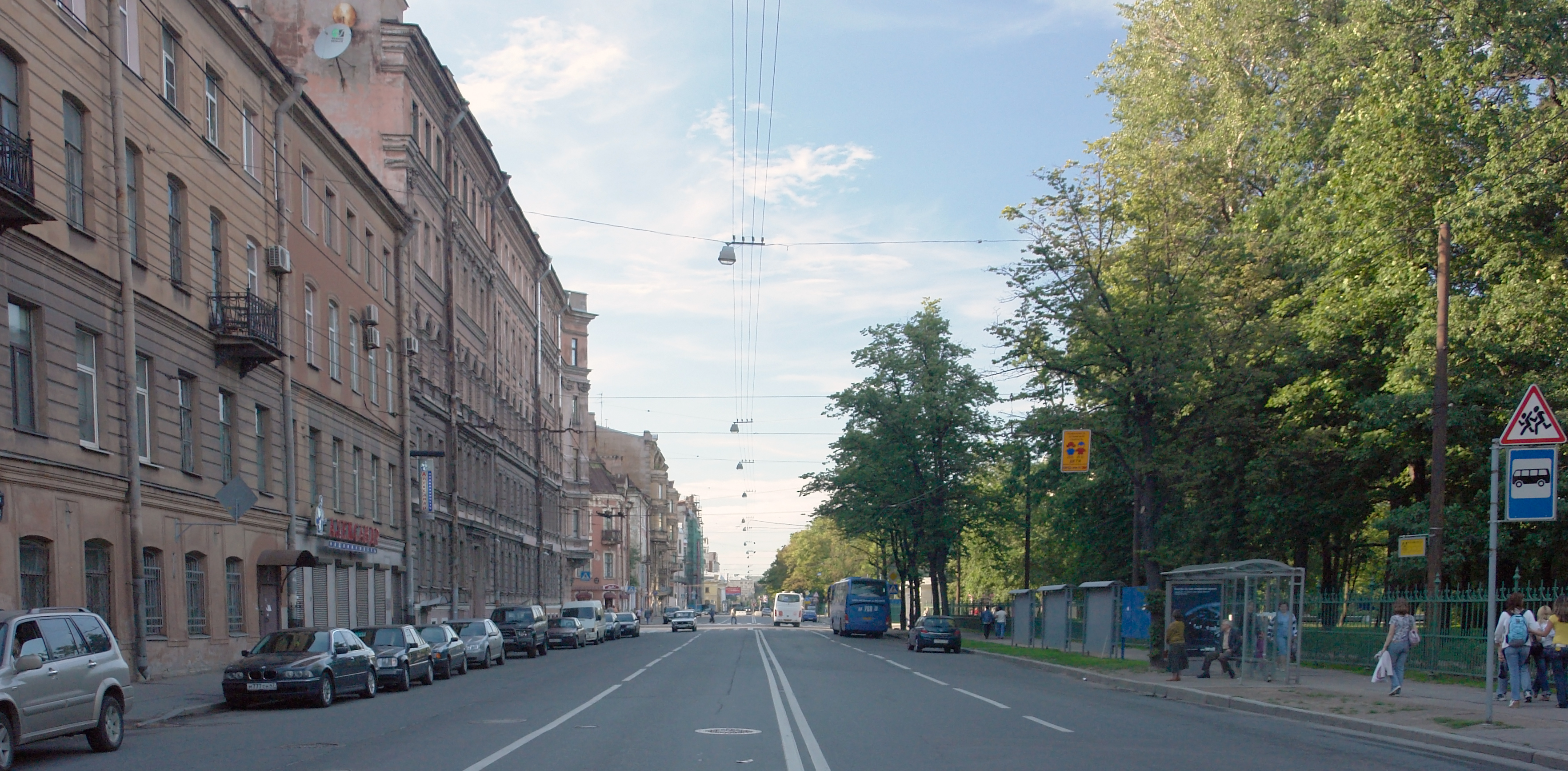 Санкт-Петербург, Потёмкиская улица, вид с Кирочной улицы. Справа за оградой — Таврический сад